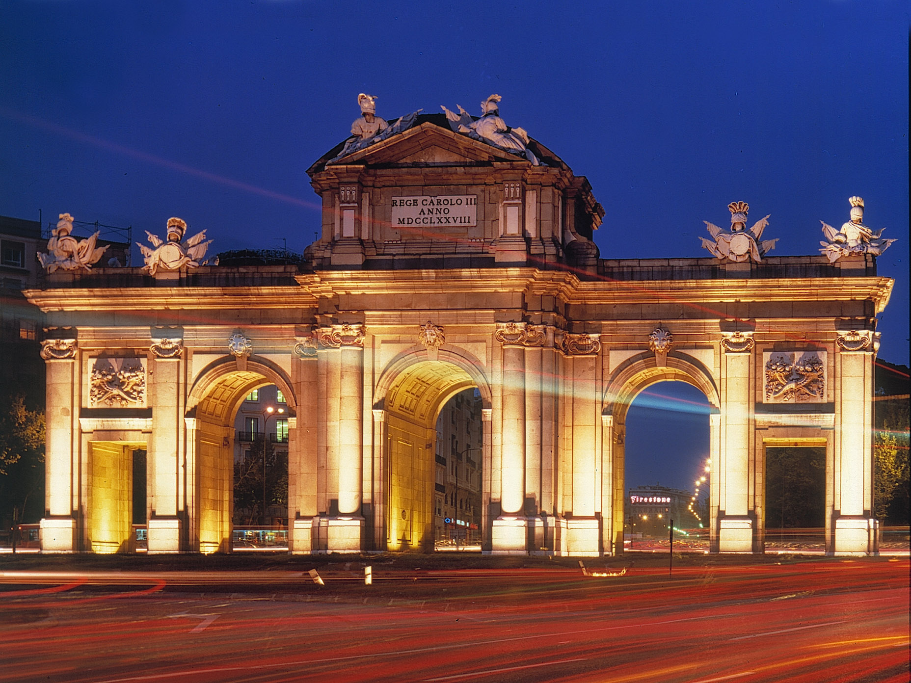 Puerta de Alcalá iluminada en Madrid.